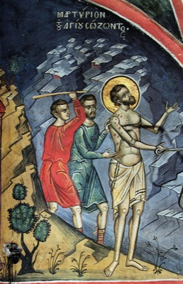 Мучение Созонта. Тзортзи (Зорзис) Фука. Фреска. Афон. монастырь Дионисиат. 1547 год.